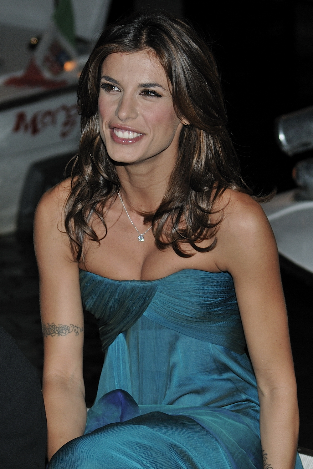 66ème Festival du Cinéma de Venise (Mostra), 6ème jour (07/09/2009) George Clooney et Elisabetta Canalis, rentrant dans leur Hôtel de Venise après le tapis rouge du film : The men who stare at goats